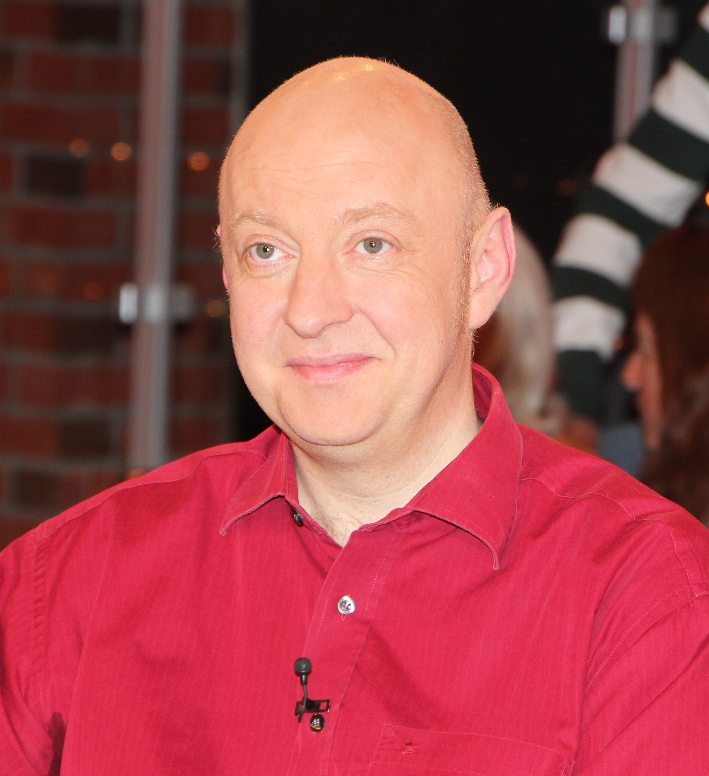 Horst Evers (* 8. Februar 1967 in Evershorst bei Diepholz; eigentlich Gerd Winter[1]) wohnt in Berlin, ist Autor und Kabarettist.